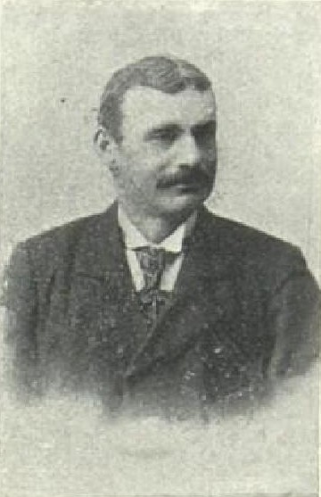 Václav Dvořák (1856-?), rakouský a český rolník a politik